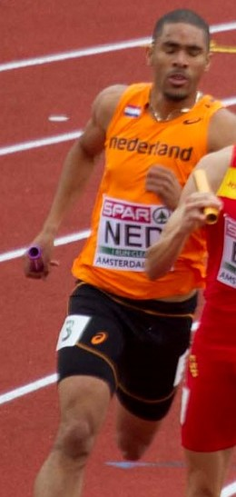 series